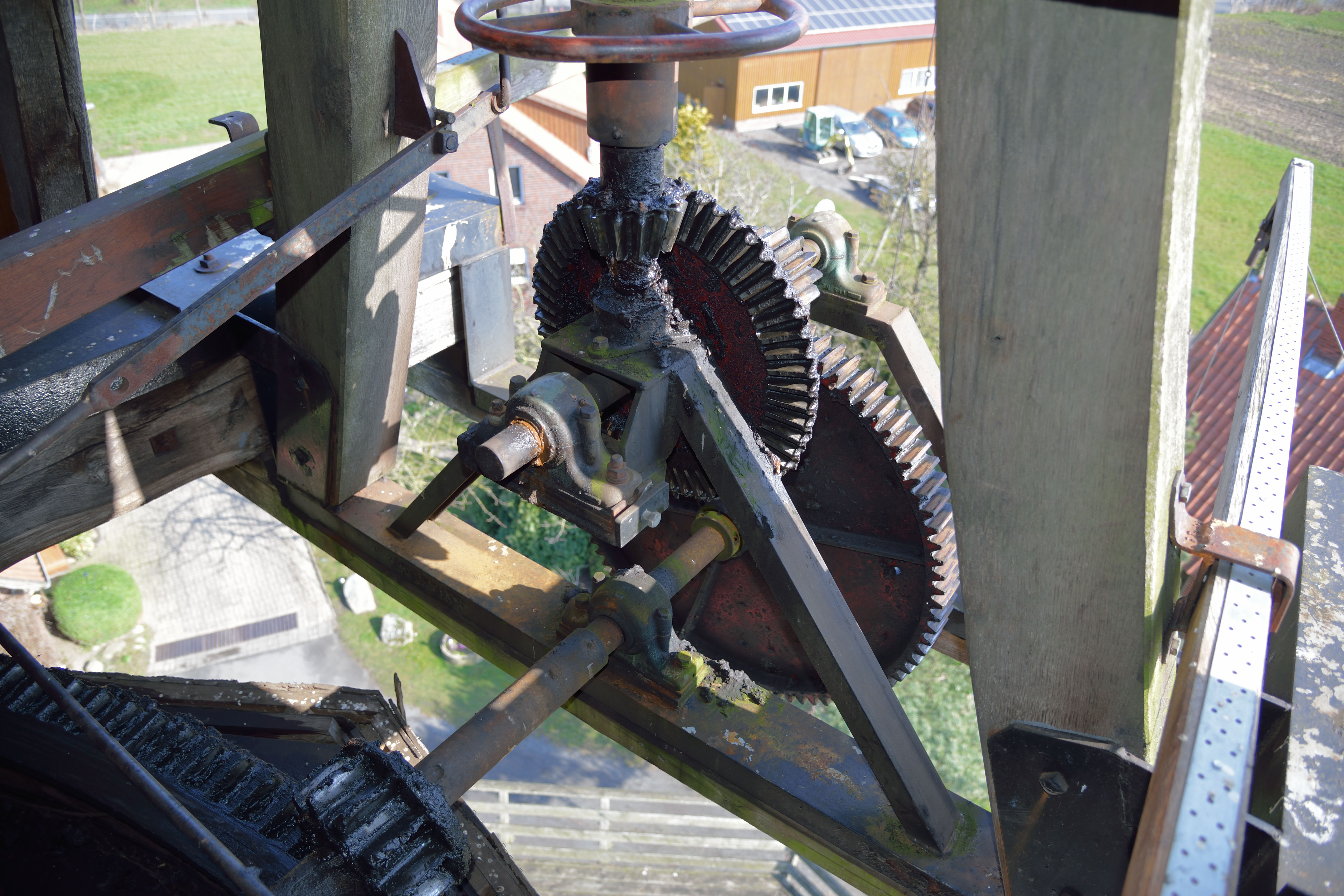 Windmühle Messlingen, Duitsland